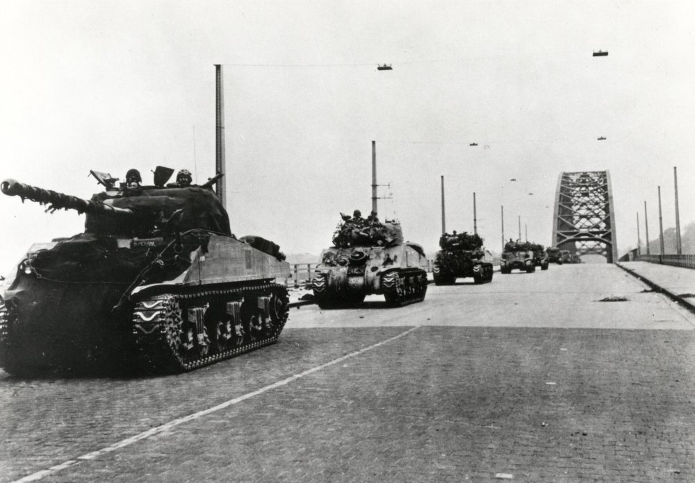 Tanks van het Britse Tweede Leger rollen ongehinderd over de intact gebleven Waalburg in Nijmegen tijdens de Slag om Arnhem. September 1944. Collectie: Spaarnestad Photo Fotograaf: Fotograaf Onbekend Datum: 09-1944 Fotonummer SFA003012896 Code: 1700-1 Voor meer informatie en foto's uit deze en andere collecties bezoek